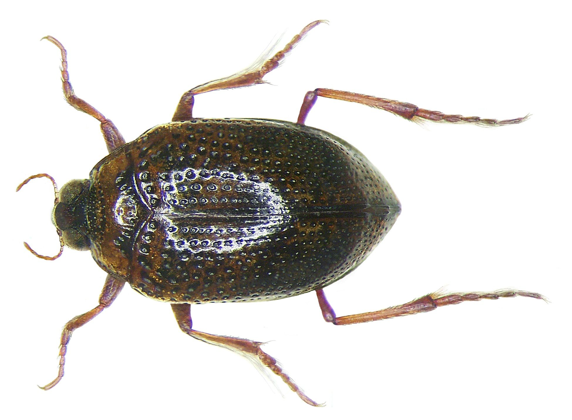 Peltodytes caesus (Duftschmid, 1805) Familie: Haliplidae Grösse: 3,5-4 mm Verbreitung: Europa, Nordafrika, Syrien Fundort: Germania, Bayern, Deggendorf leg.det. U.Schmidt, 1978 Foto: U.Schmidt, 2008